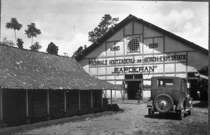 Foto. De achterzijde van de fabriek met droogloods van de Machinale Houtzagerij en Boschexploitatie bedrijf 'Sapoeran' in de omgeving van Wonosobo